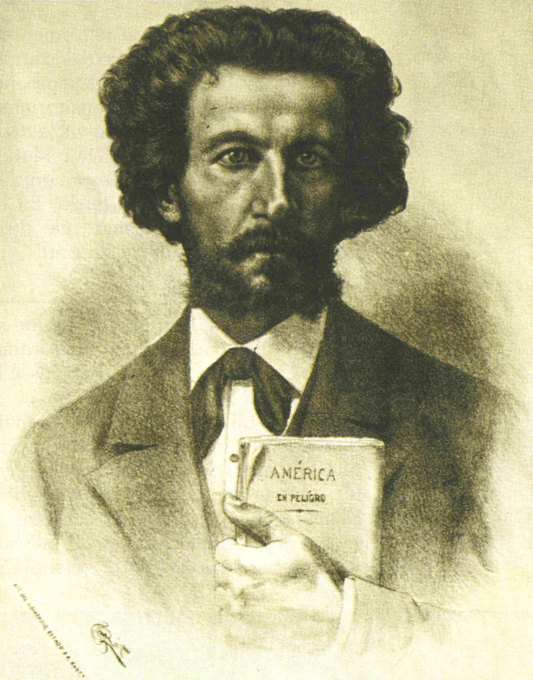 Francisco Bilbao Barquín (Santiago, Chile, 9 de enero de 1823 - Buenos Aires, Argentina, 19 de febrero de 1865). Escritor y político chileno; por sus ideas liberales lo llamaron Apóstol de la libertad.